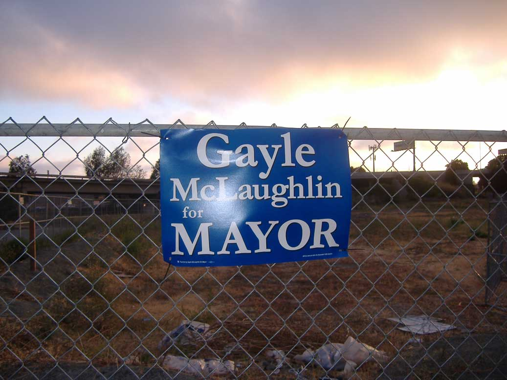 keep it =p